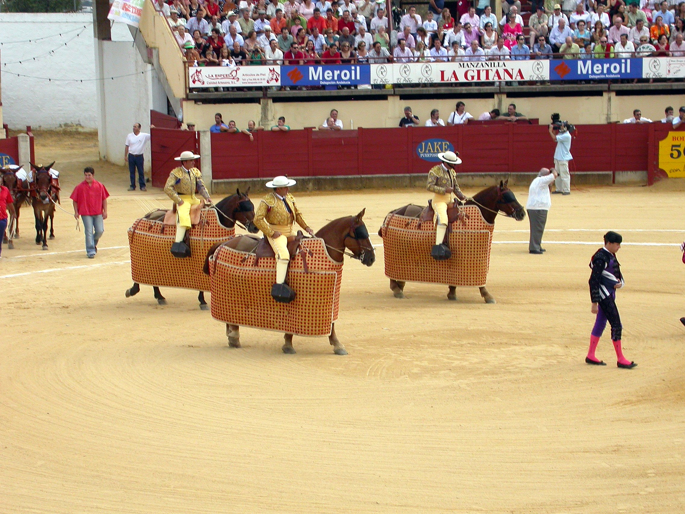 Adieux de Jesulín de Ubrique, le 15 septembre 2007 Paseo, défilé de trois picadors, suivis du train d'arrastre (mules)